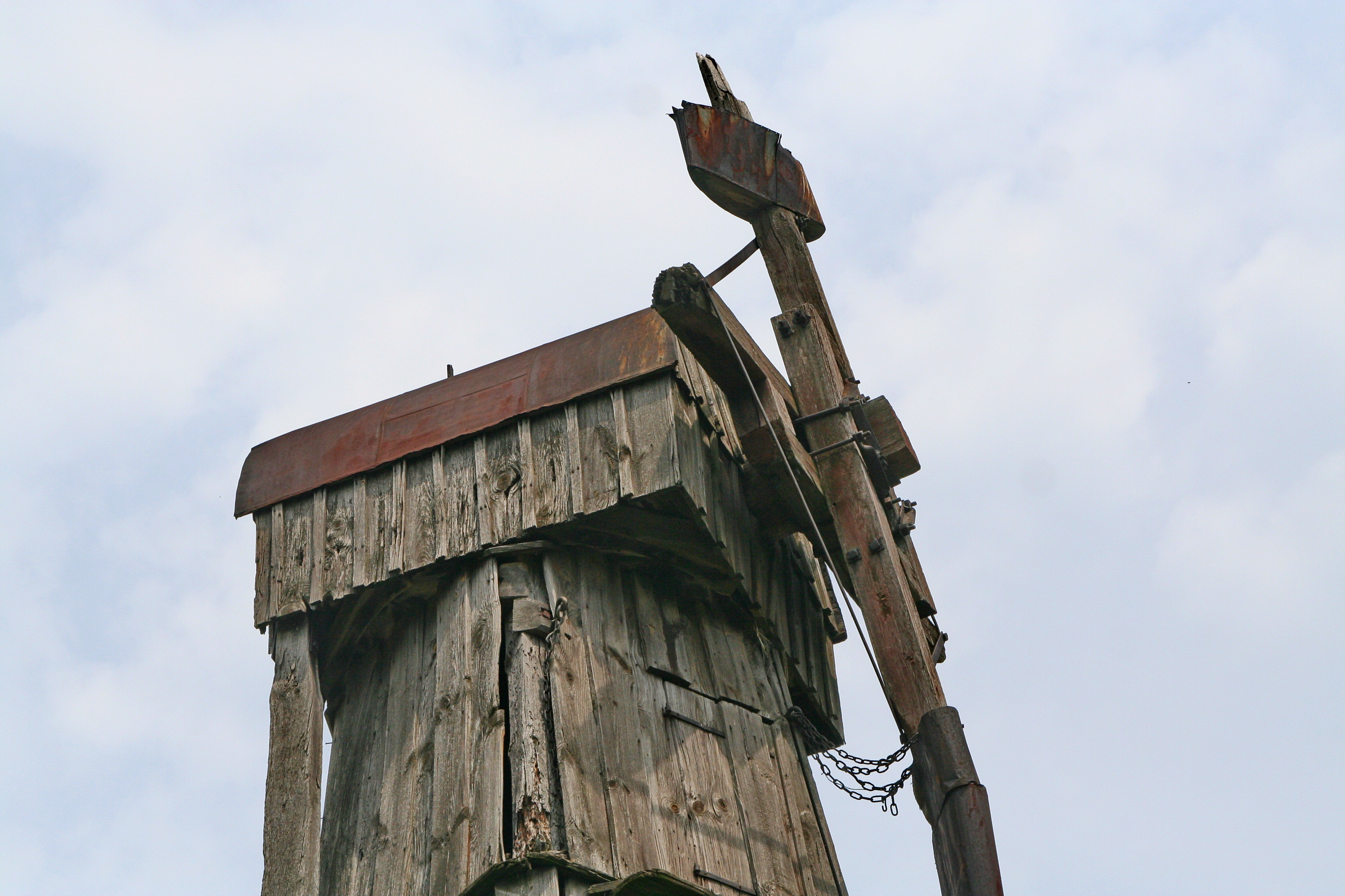 Вітряк (дер.), с. Грищенці